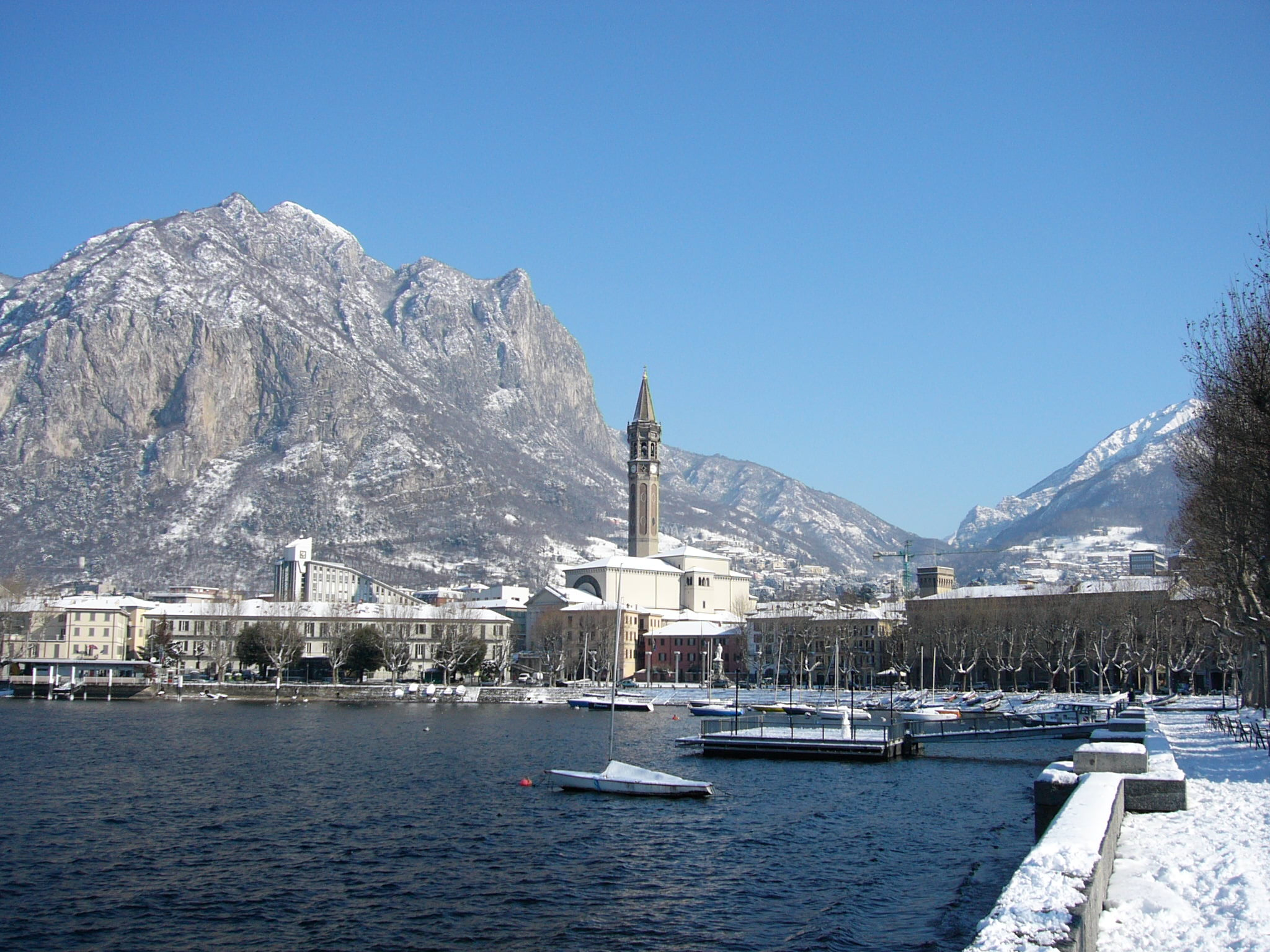 Lecco innevata, sullo sfondo il Monte San Martino